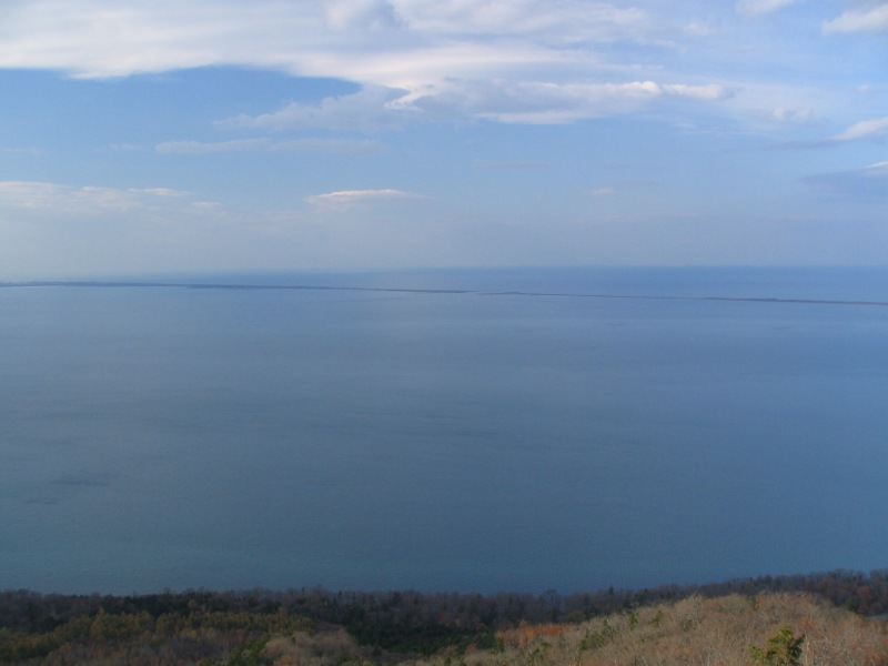 Lake Saroma